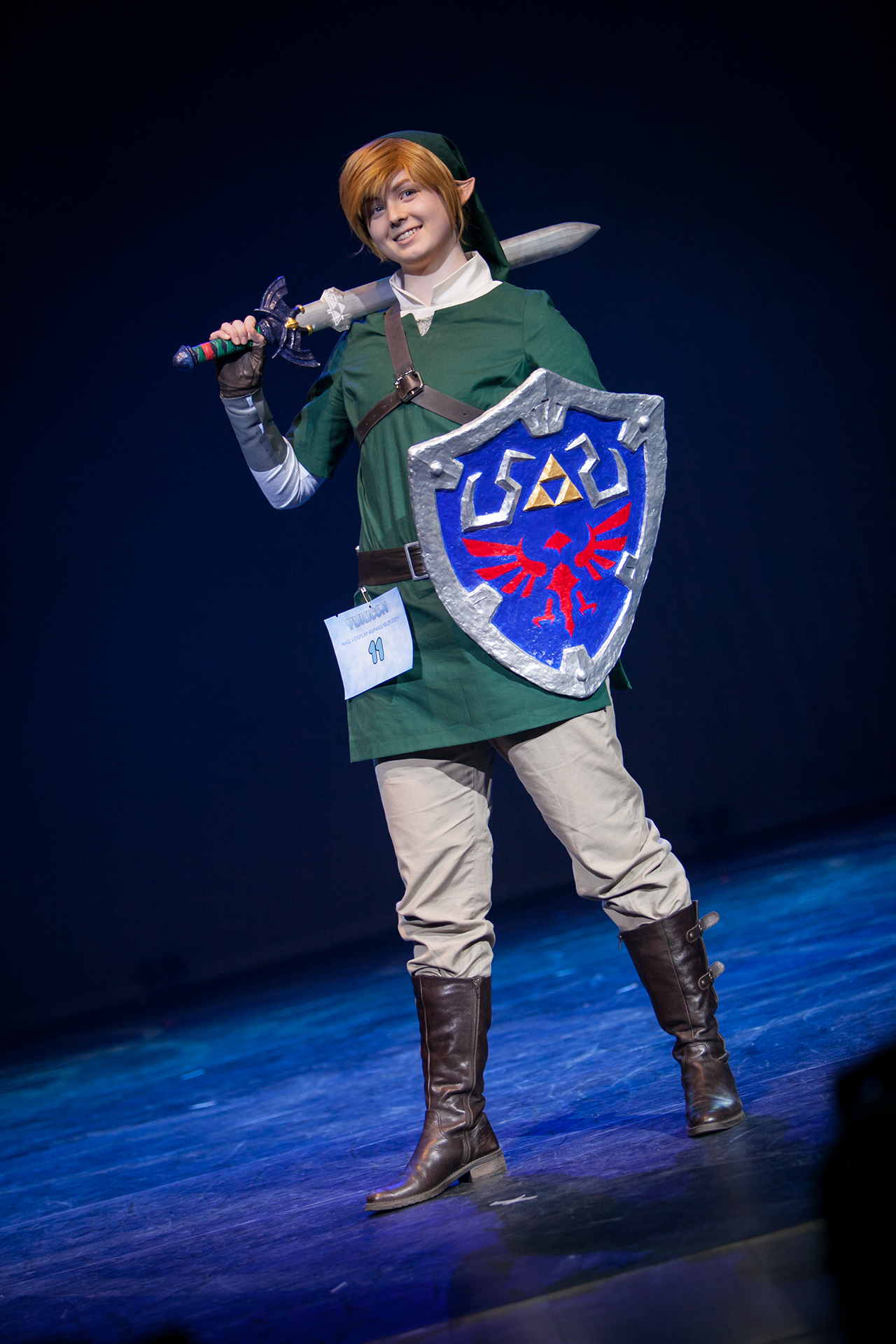 20140118174133IMG_5689